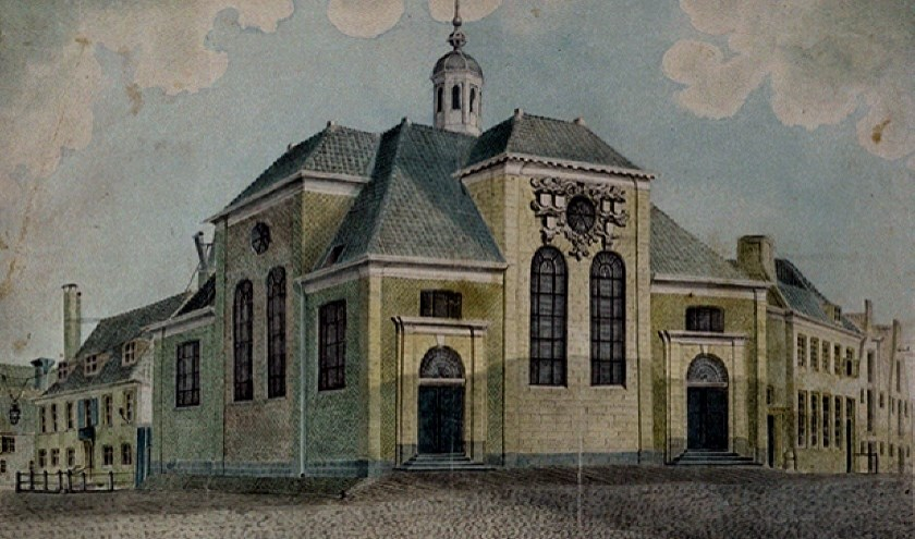 Schotse Kerk uit 1697 aan het Vasteland, op de hoek met de Herderstraat. Uitbreiding van het kerkgebouw met een armenhuis voor weduwen en wezen van gesneuvelde Schotse soldaten volgde in 1722. Deze kerk ging in 1940 bij het bombardement op Rotterdam verloren.